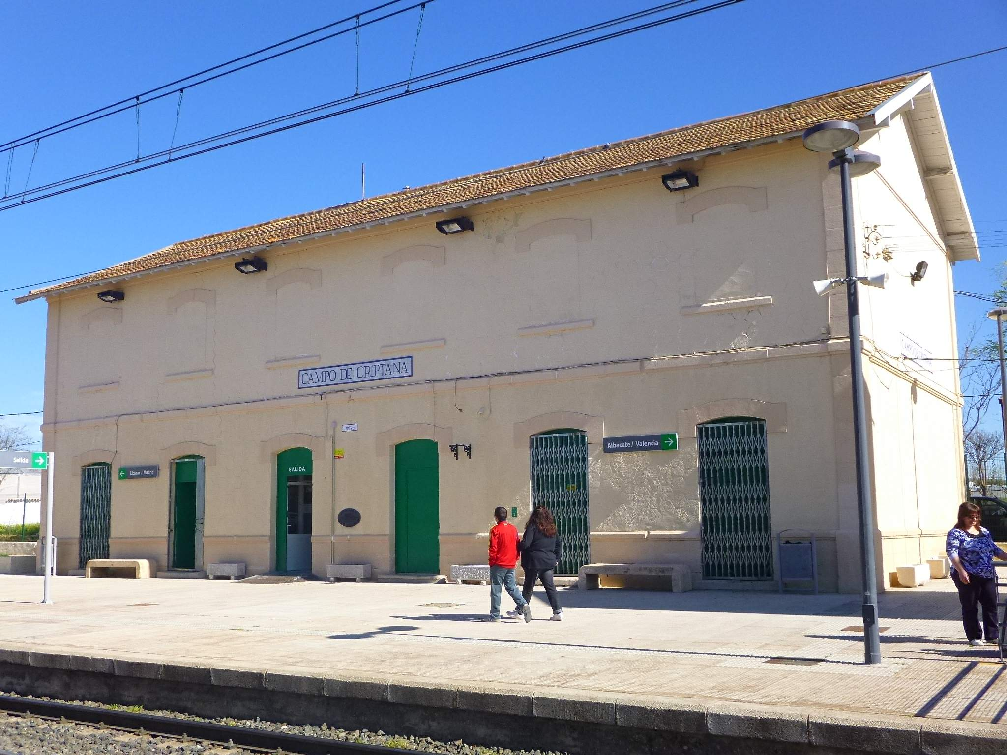 Estación de Adif de Campo de Criptana (Ciudad Real)